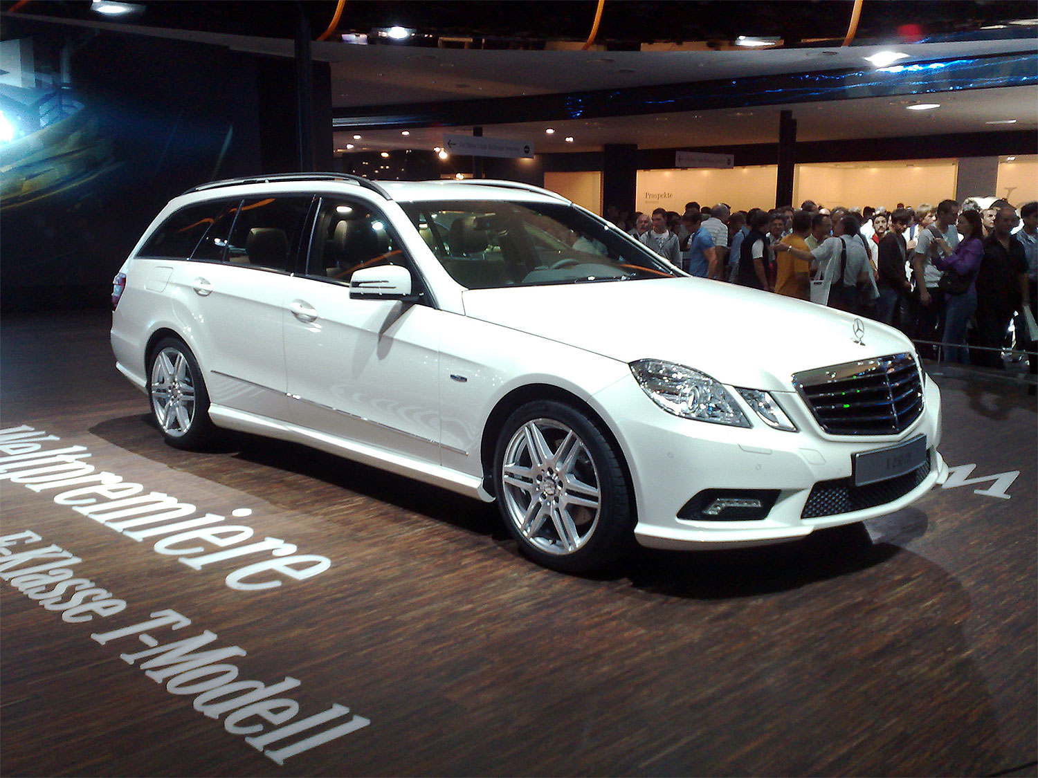 Mercedes-Benz E-Klasse T-Modell (S212) auf der IAA 2009